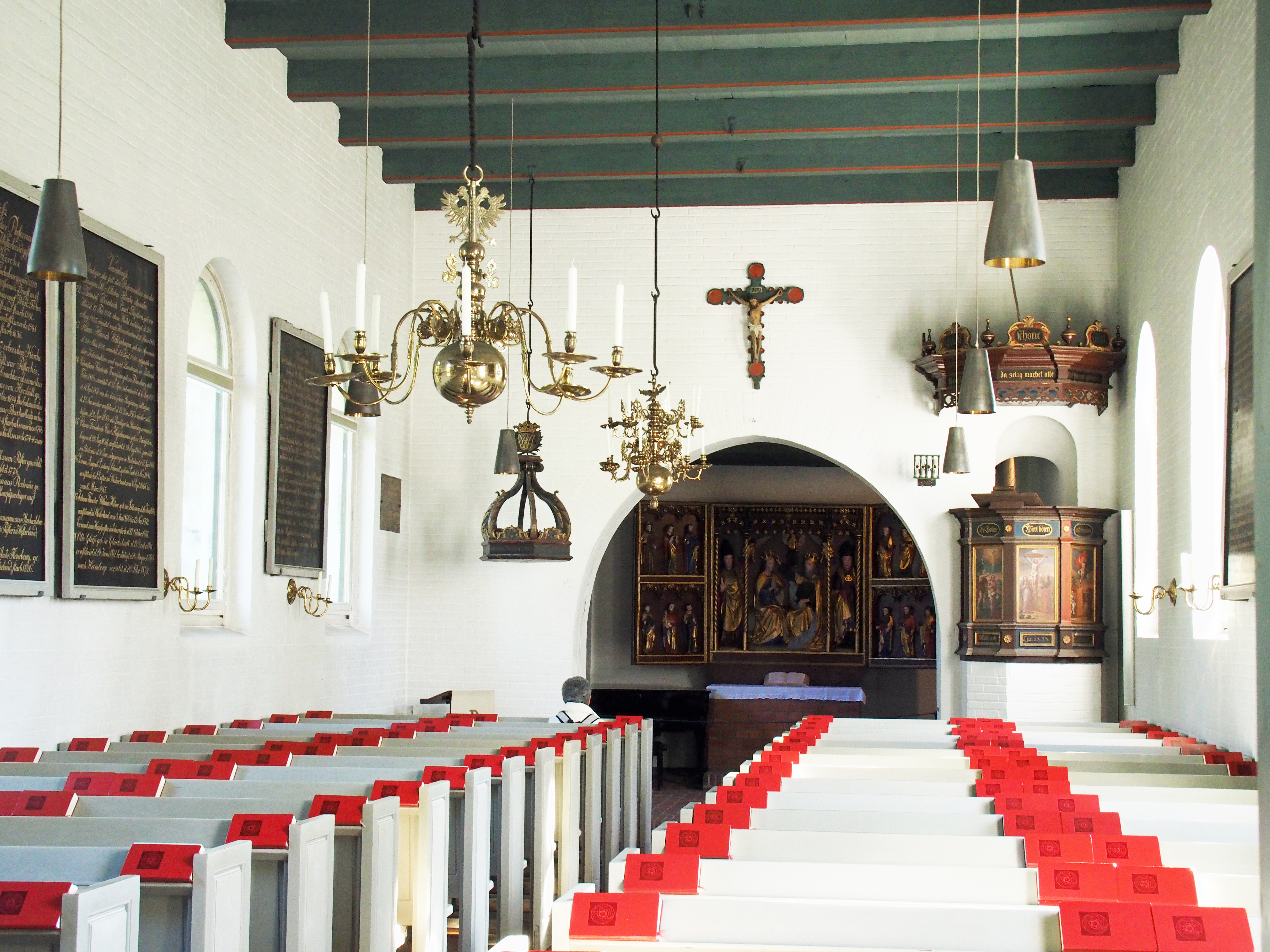 Innenraum der Kirche St. Niels, Westerland (Sylt), mit Altar, Kanzel und Passionskreuz